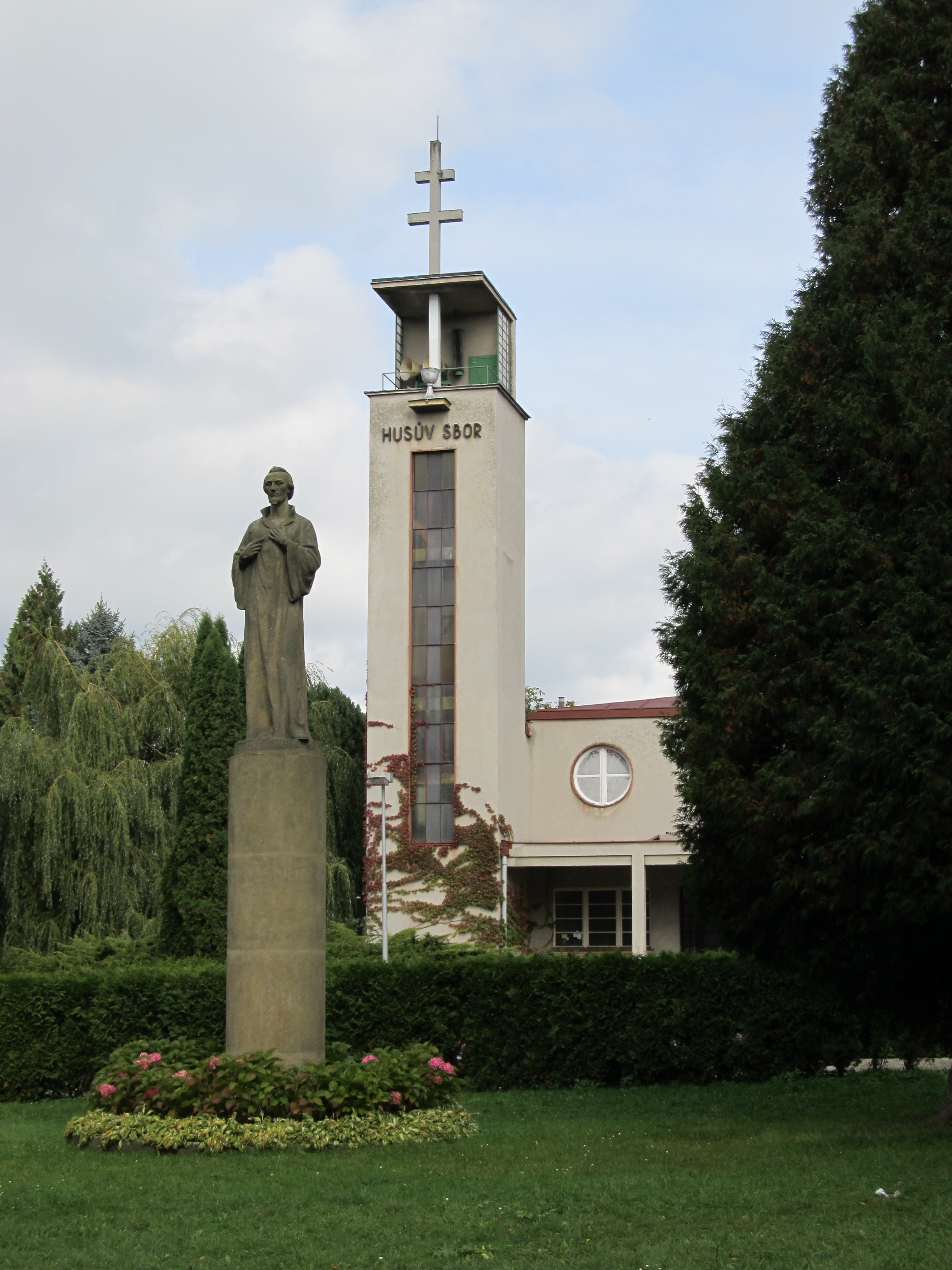 Husův sbor (Nové Město nad Metují), Husova, Nové Město nad Metují